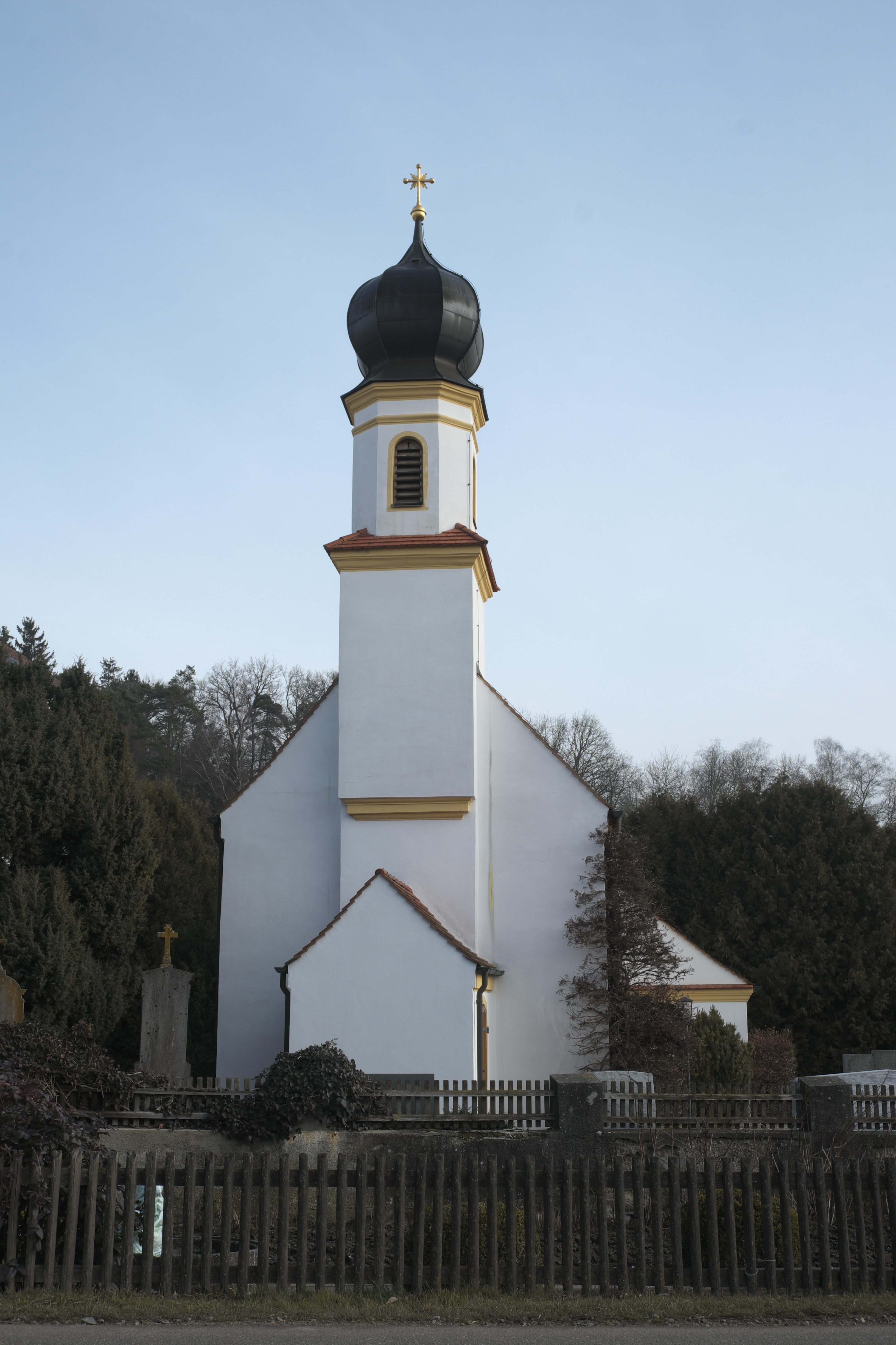 Katholische Filialkirche St. Ulrich in Holzhausen (Schweitenkirchen) im oberbayerischen Landkreis Pfaffenhofen an der Ilm (Bayern/Deutschland)